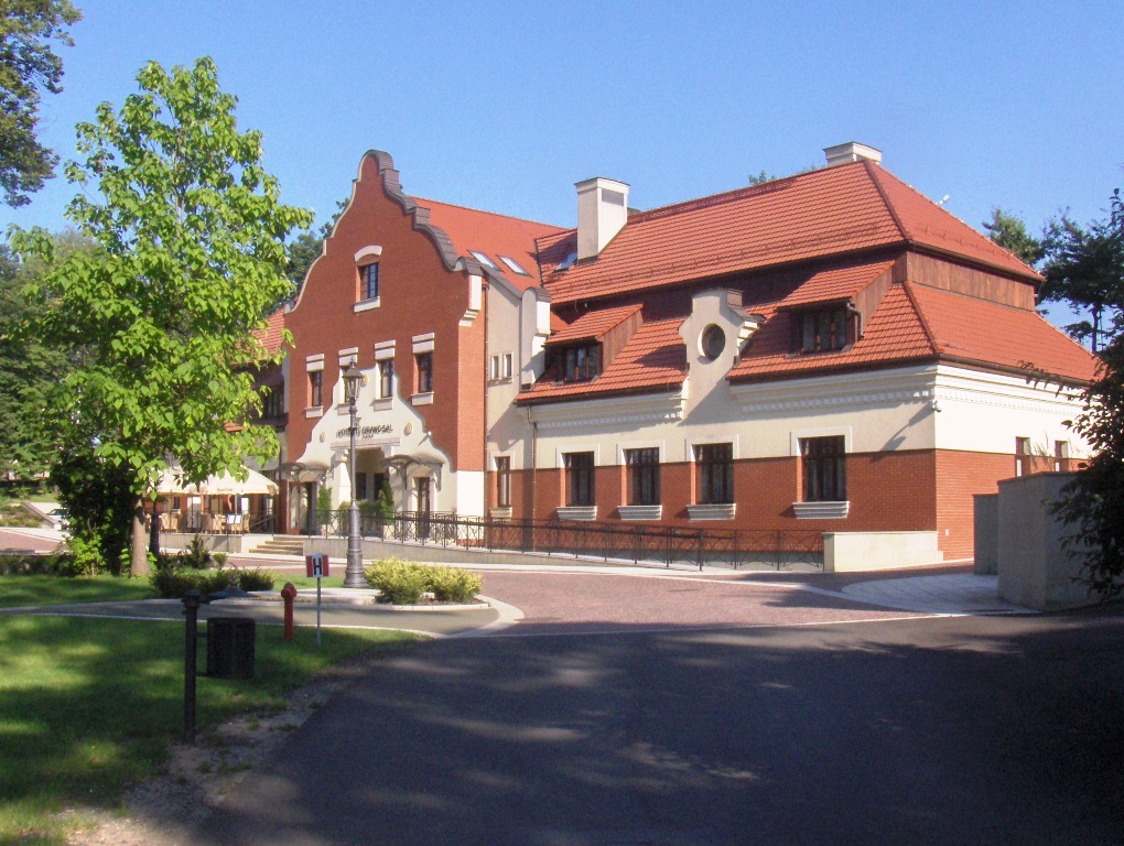 Wieliczka, Park Królowej Kingi 7 - dawna Łaźnia Salinarna, obecnie "Hotel Grand Sal"